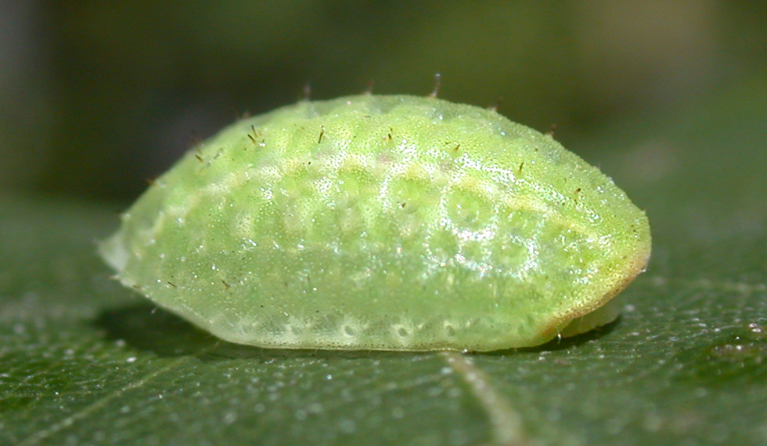 Apoda limacodes Larva